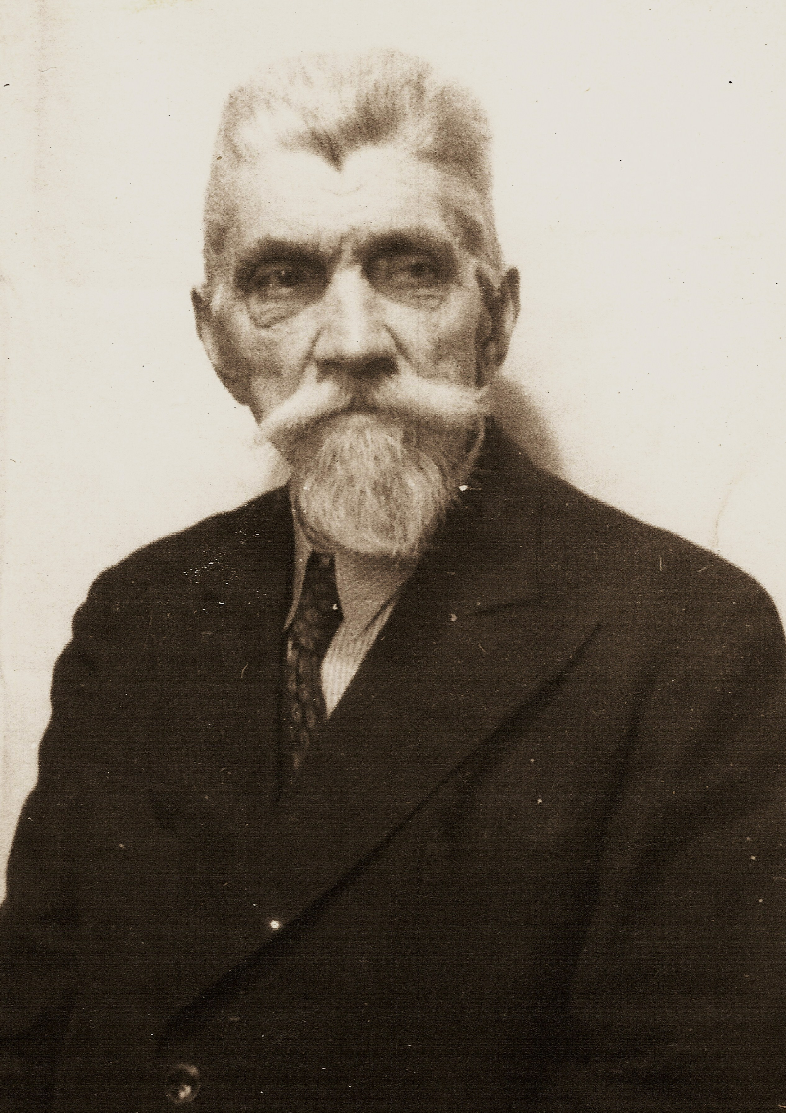 Stanisław Kochowicz, Kraków, 1944 r.